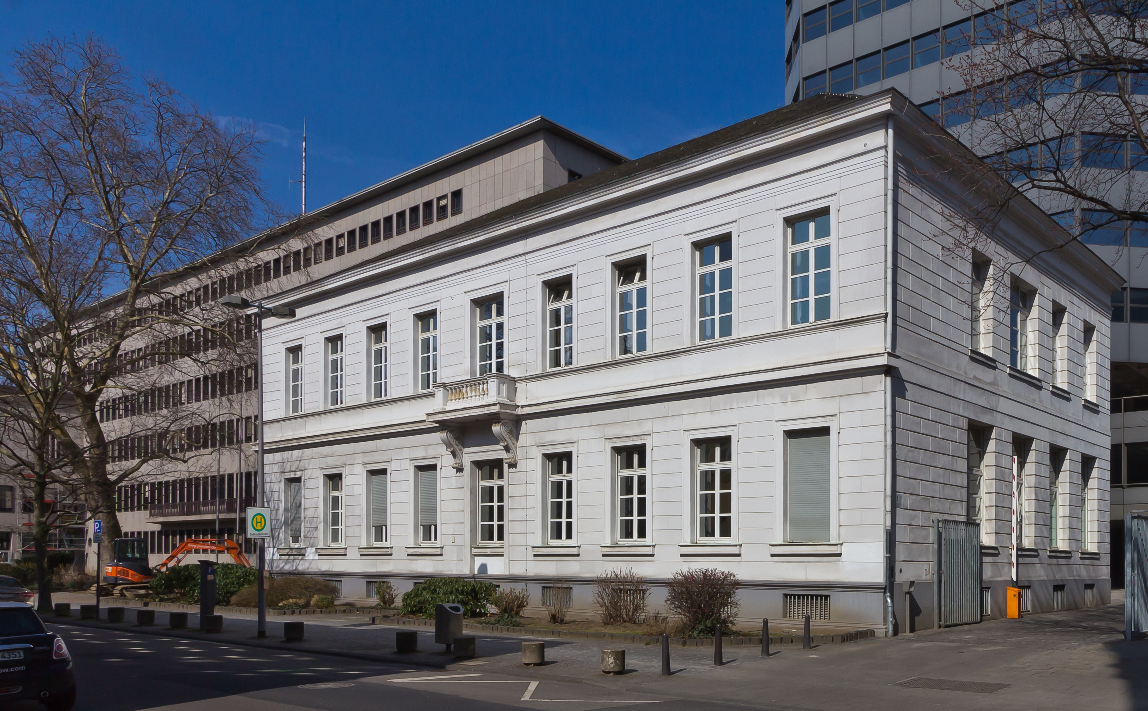 Denkmalgeschütztes Verwaltungsgebäude: Ostflügel des Regierungspräsidiums, Zeughausstr. 4-8. Architekt: Matthias Biercher, errichtet: 1830-1832. Stil: Klassizismus